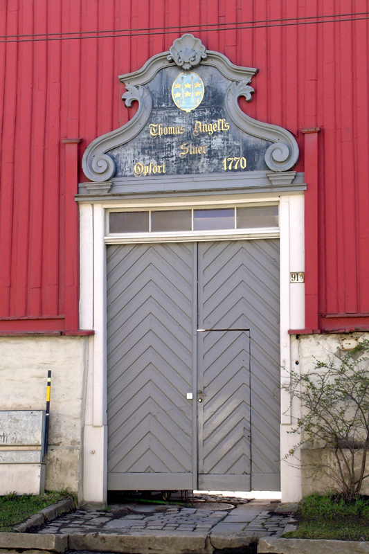 Thomas Angells Stuer, Trondheim. Port.